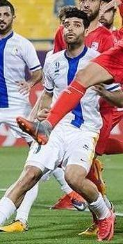 دیدار تیم های فوتبال تراکتورسازی تبریز و الغرافه قطر